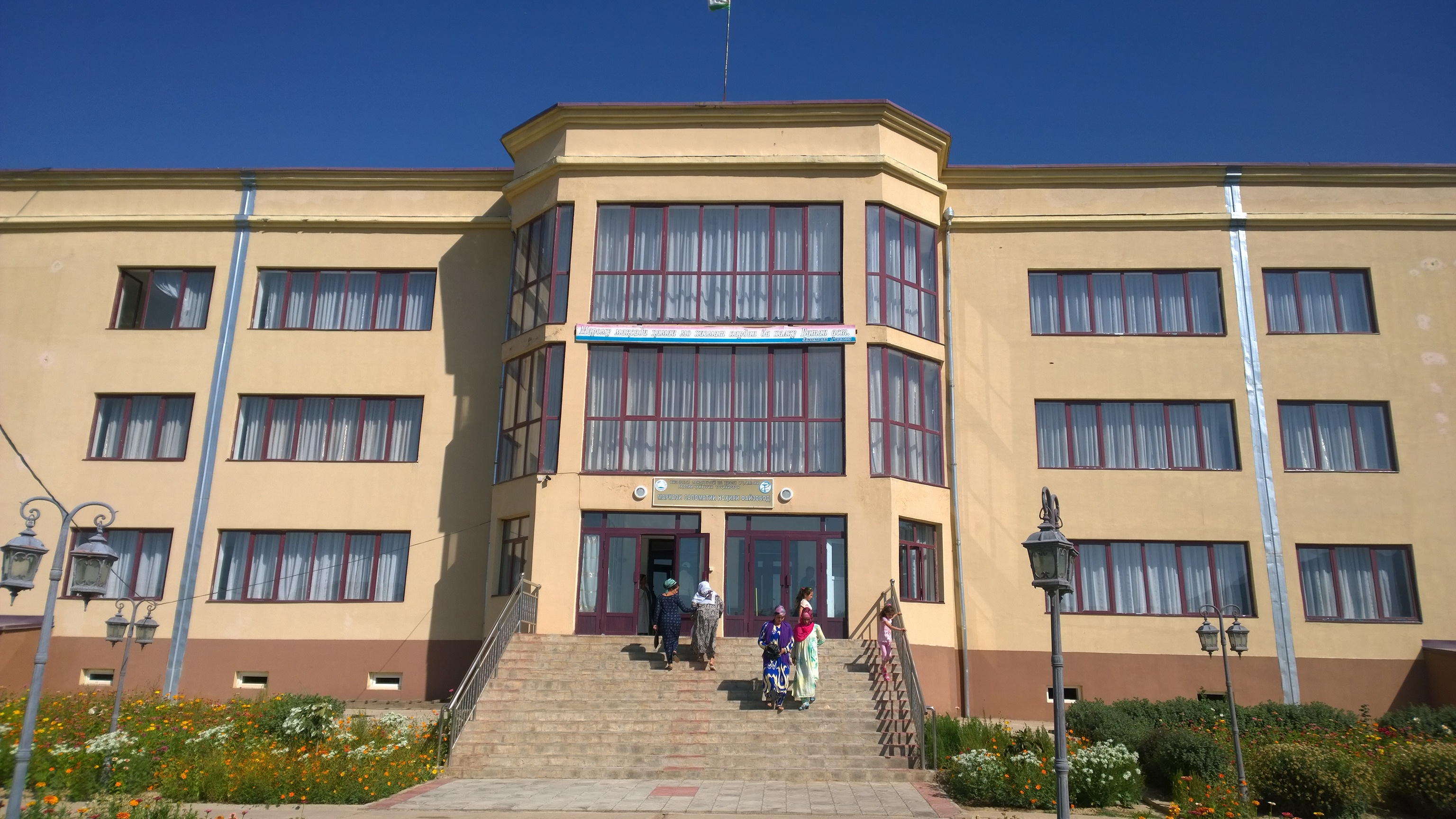 Тоҷикӣ: Маркази саломатии ноҳияи Файзобод